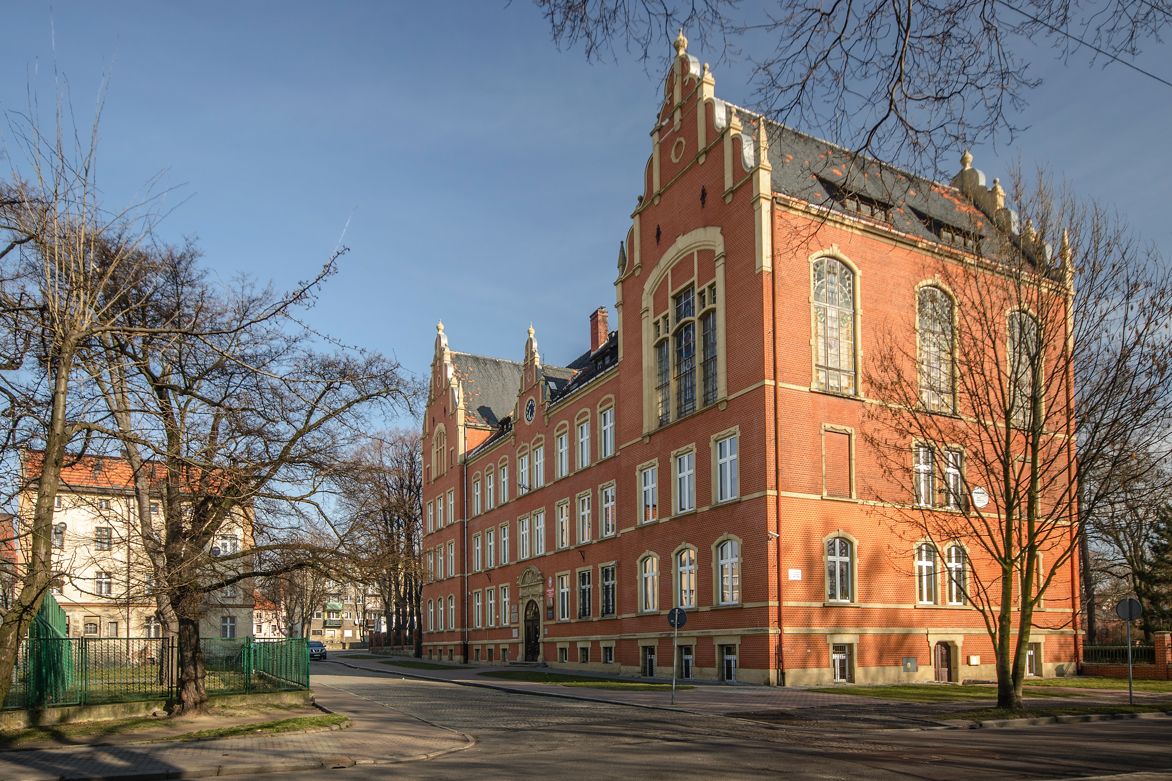 Gimnazjum nr 2 im. Mikołaja Kopernika, Chojnów, pow. legnicki, woj. dolnośląskie